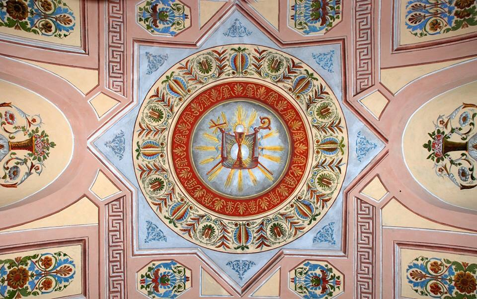 Fresque de l'Eglise de Cargiaca